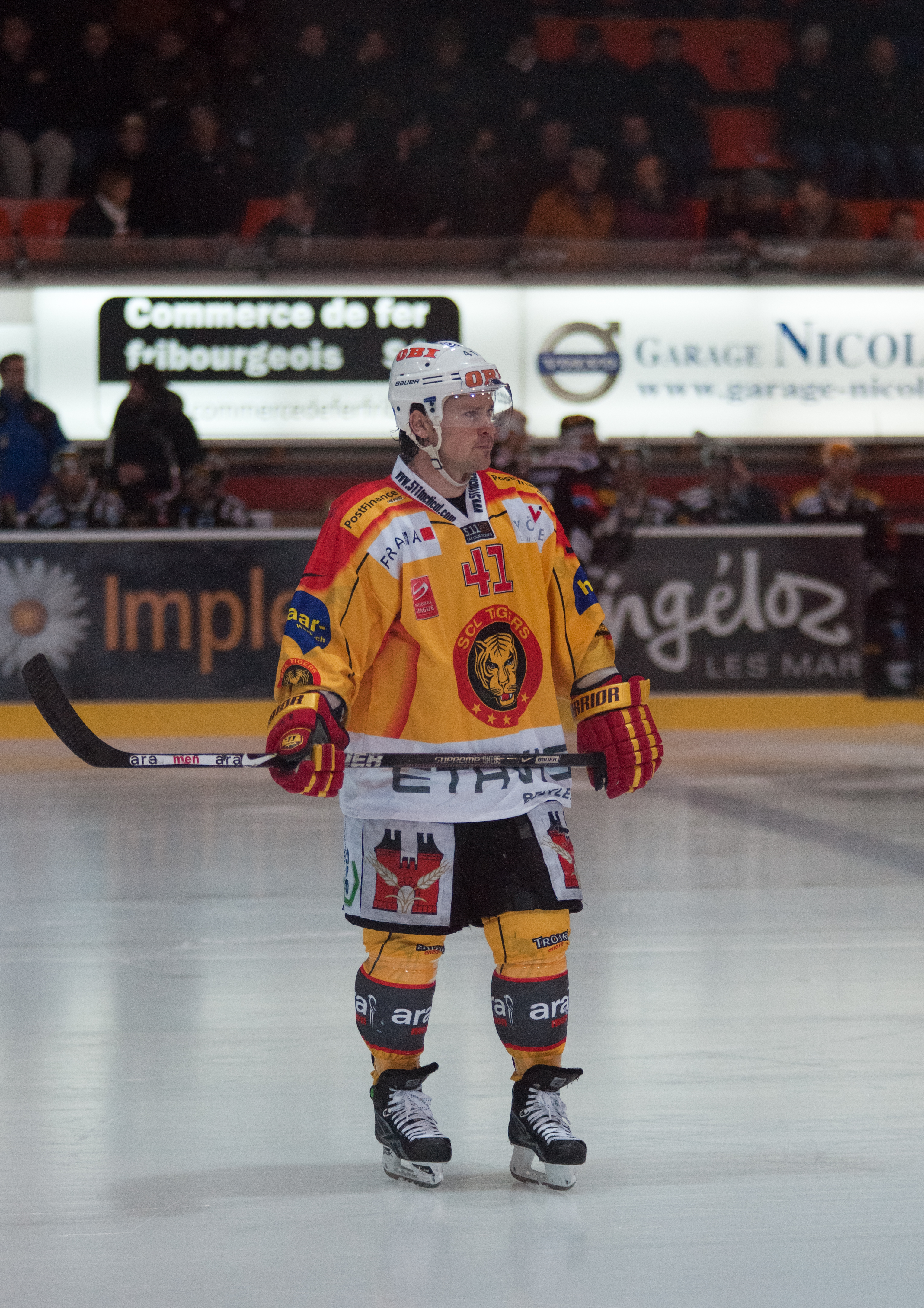 Curtis Murphy lors d'un match des Fribourg-Gottéron contre le SC Langnau.